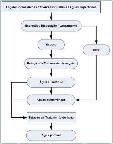 Fluxograma do composto Naftaleno